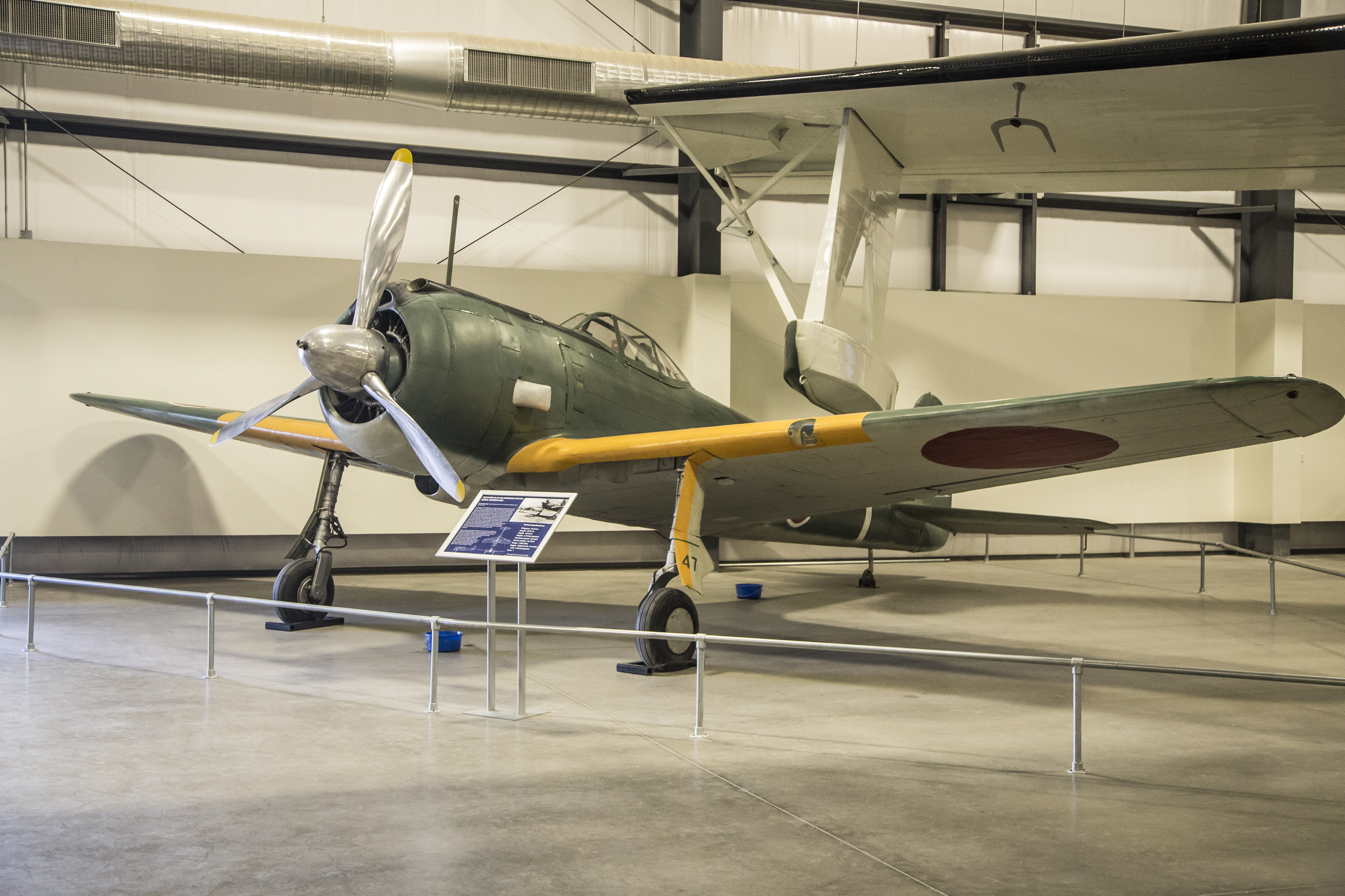 ピマ航空宇宙博物館にて